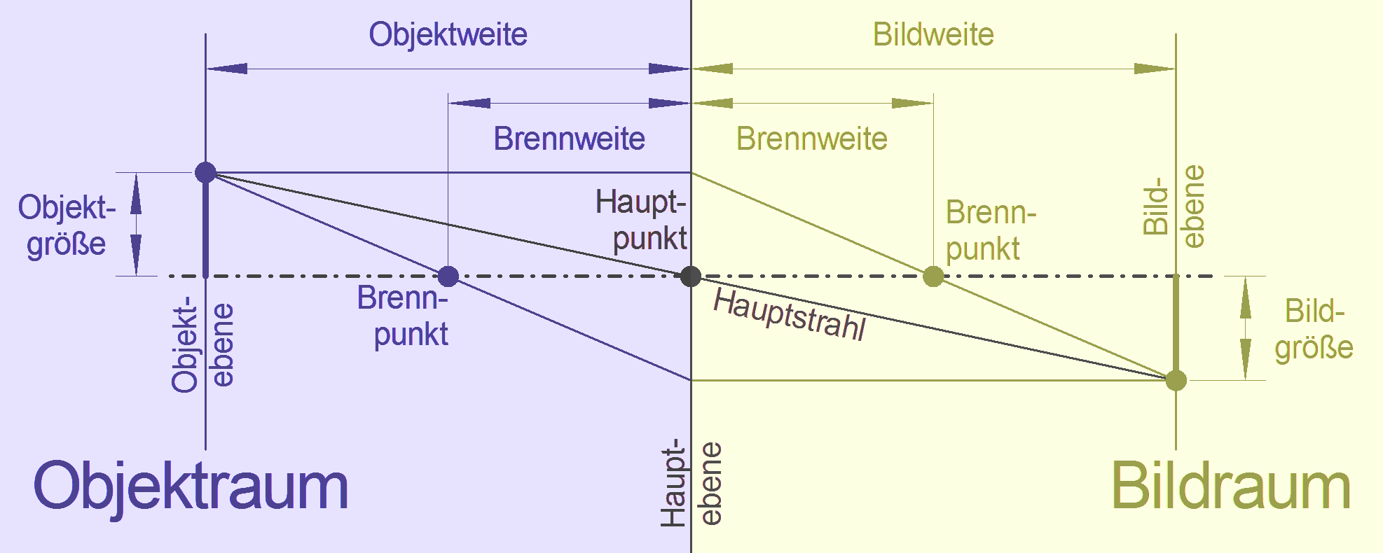 Parameter der Abbildungsgleichung bei einem konvergenten Strahlengang.